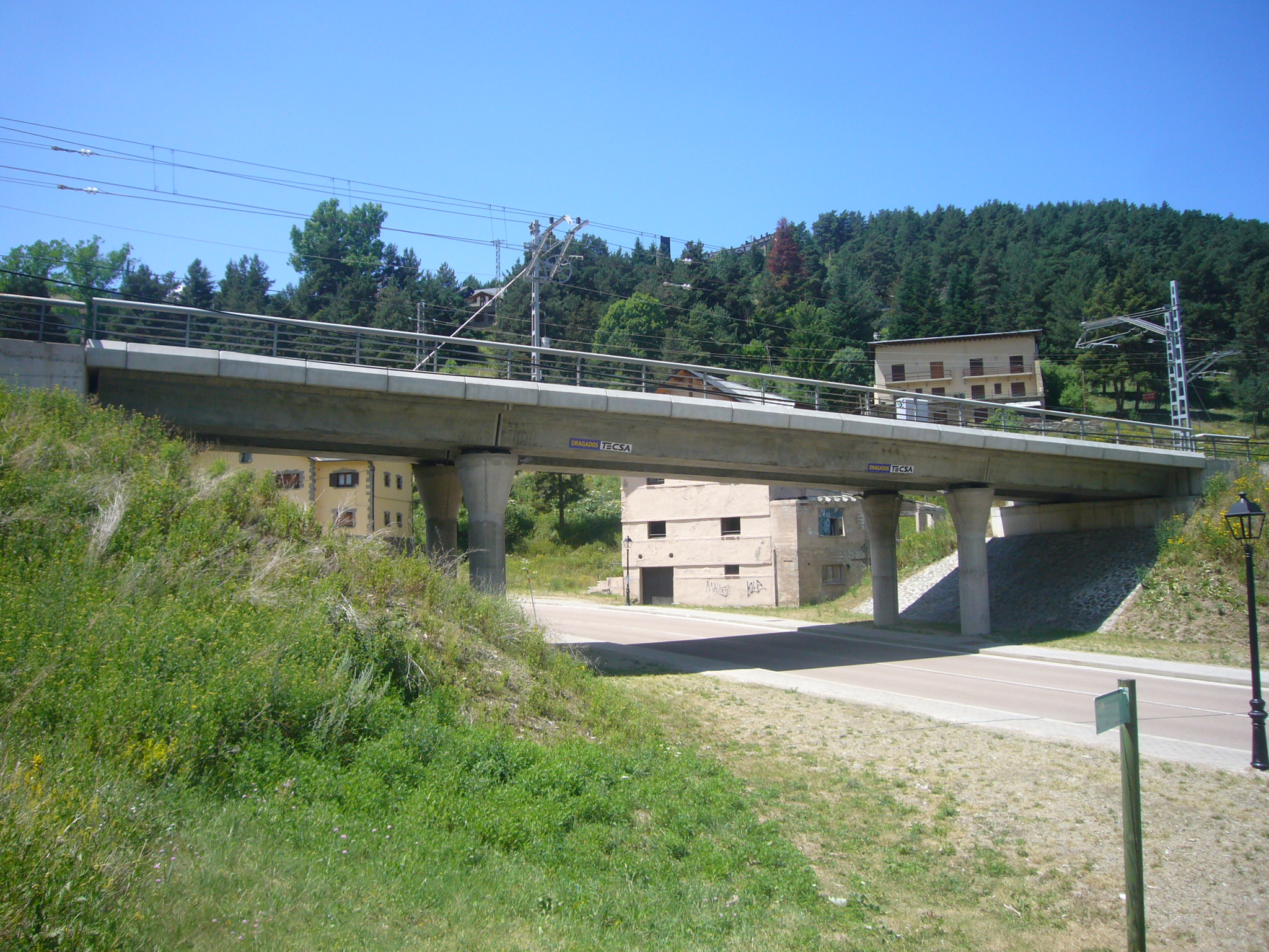 Pont de la linia de tren Ripoll-Puigcerdà al barri de l'estació de tren de la Molina.